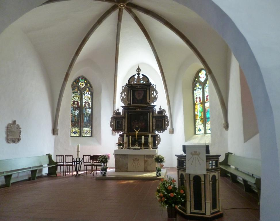 St. Nicolai